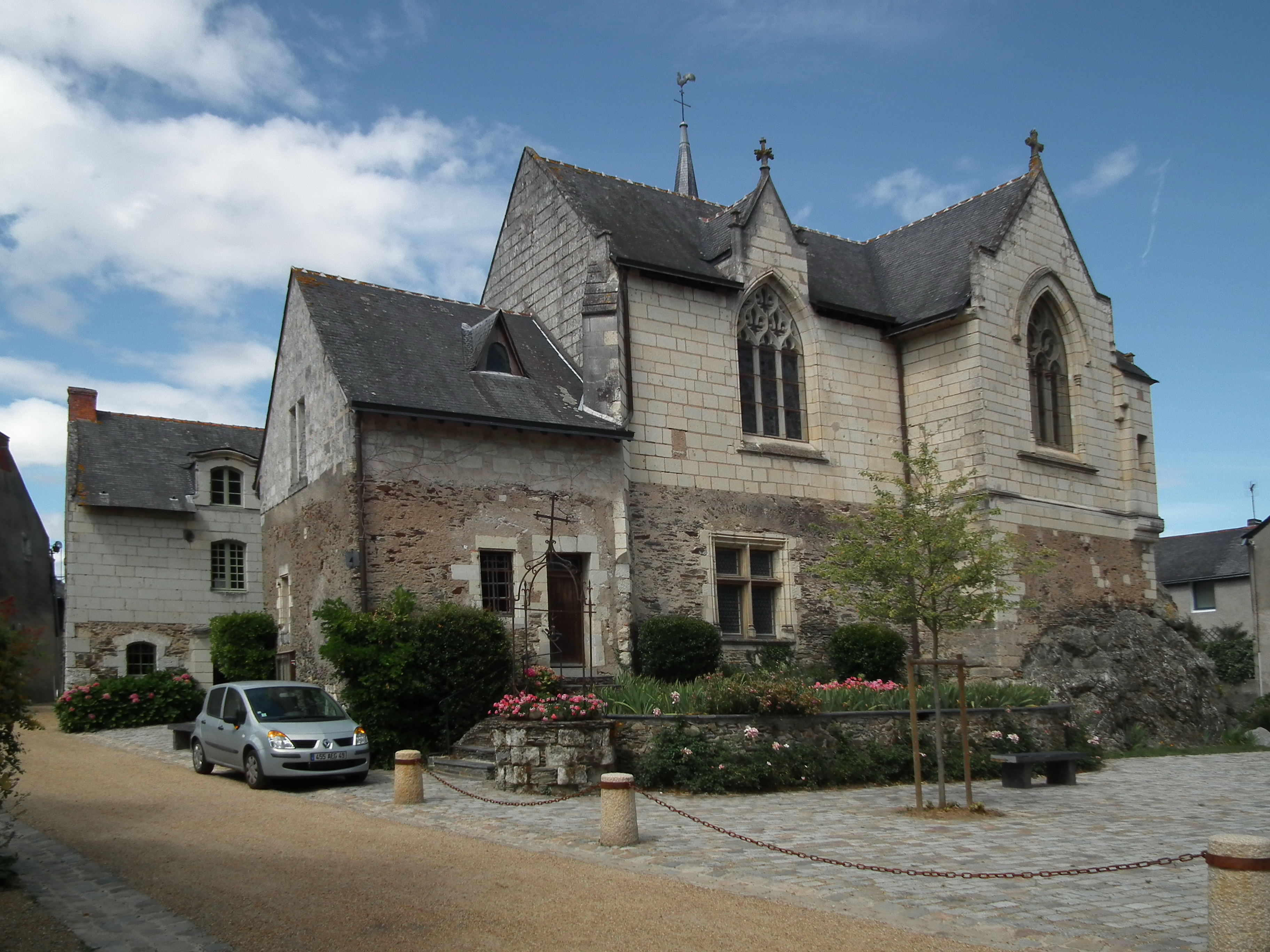 Église Notre-Dame, Béhuard, France